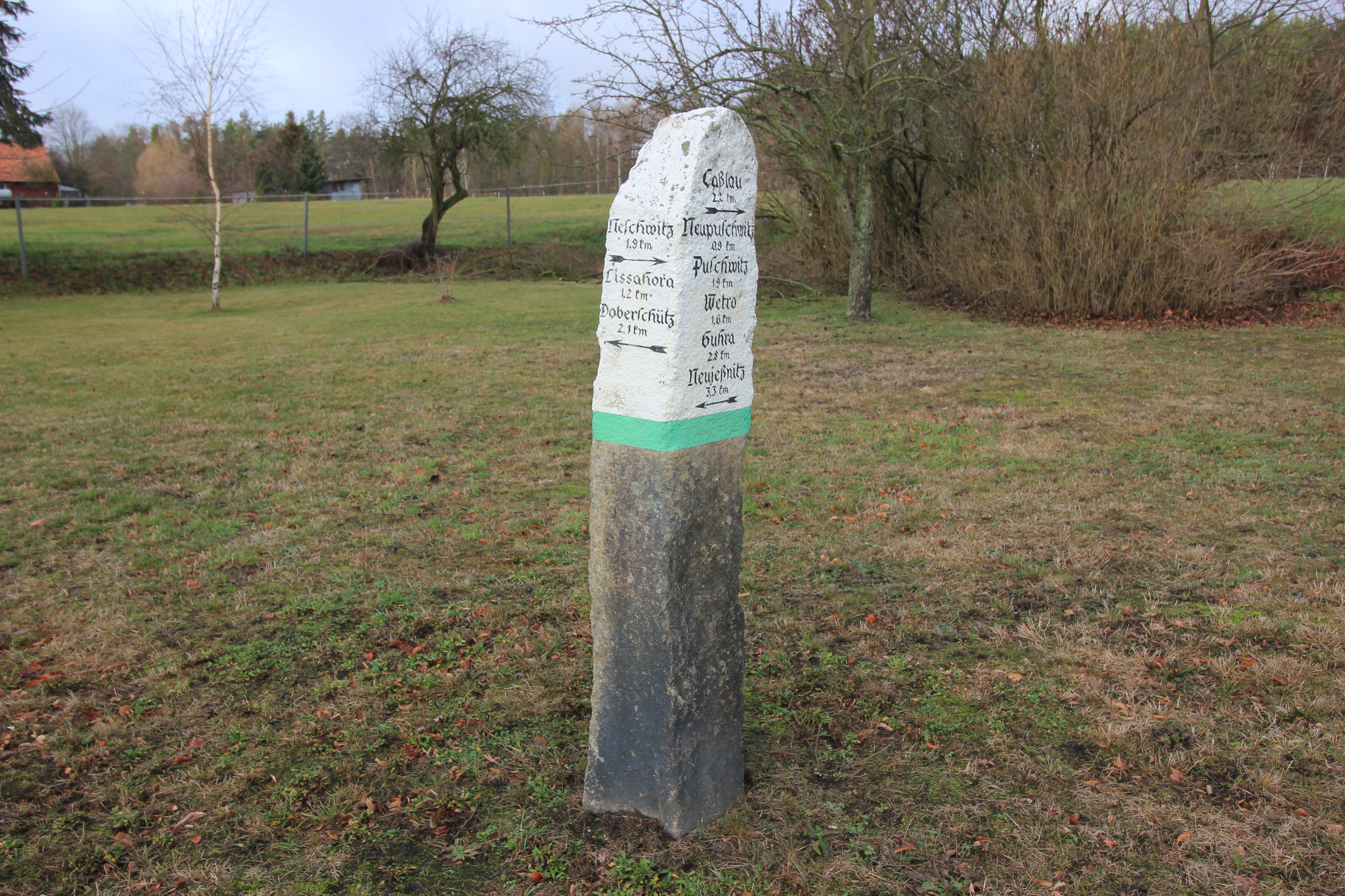 Hornjoserbsce: Łomsk pola Njeswačidła; kamjentny pućnik před ležownosću čo. 8 (kulturny pomnik).